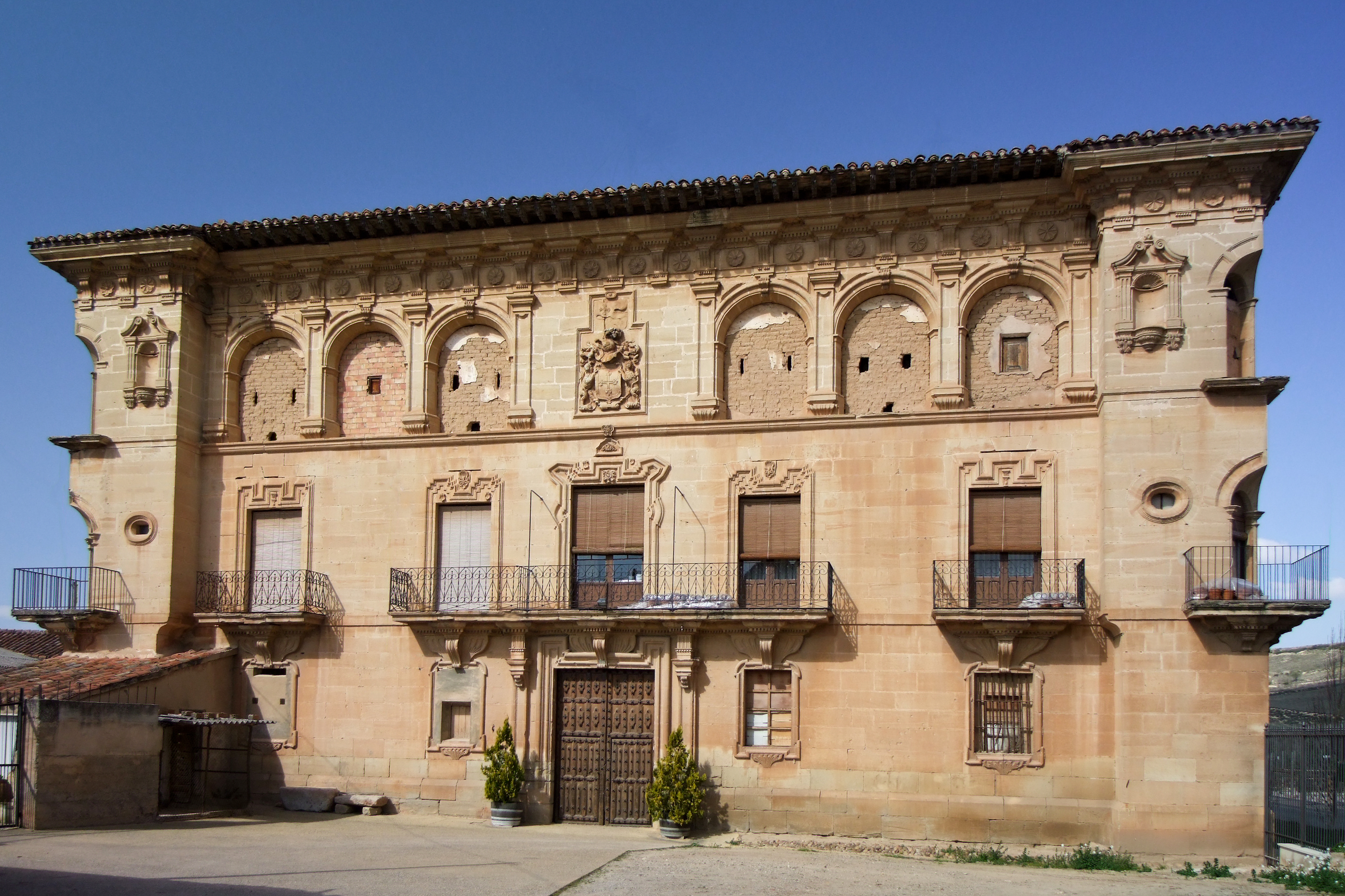 Palacio de los Marqueses de Terán, antigua sede de la Real Junta de Cosecheros en la localidad de Fuenmayor, La Rioja - España